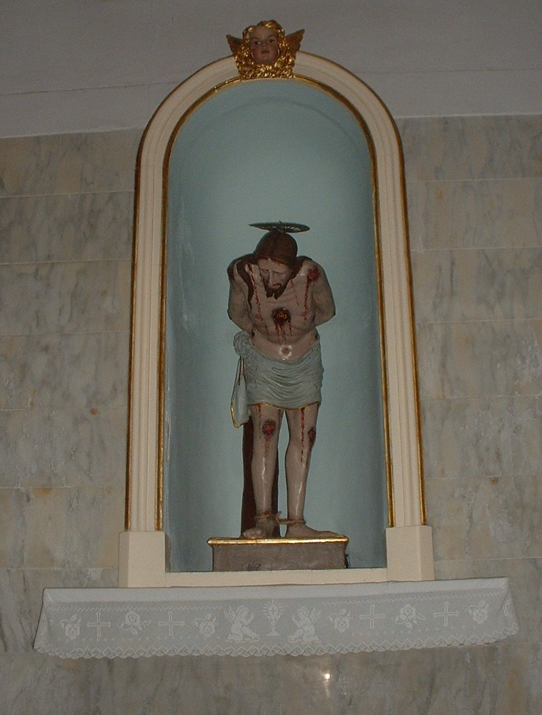 Solarino, Chiesa Madre San Paolo Apostolo, "Cristo alla colonna" (1817)